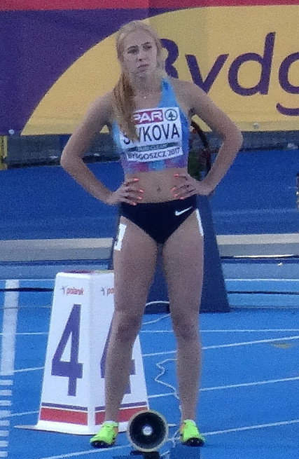 Młodzieżowe Mistrzostwa Europy w Lekkoatletyce U23 w Bydgoszczy 13-16 lipca 2017, półfinał biegu na 100 m kobiet